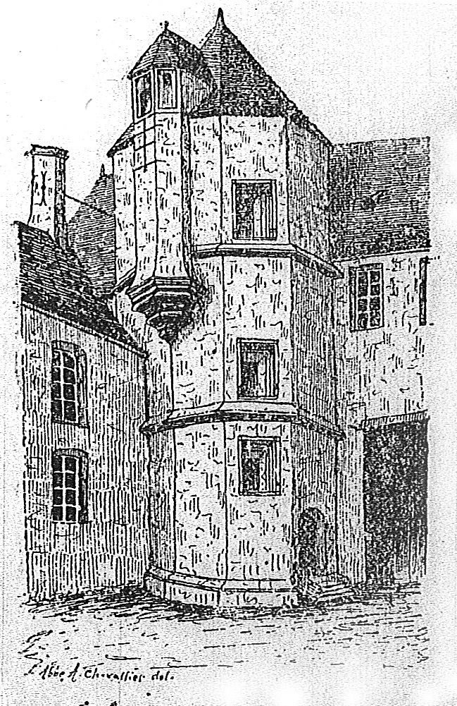 vue de Lagery, le chateau par l'abbé chevalier .